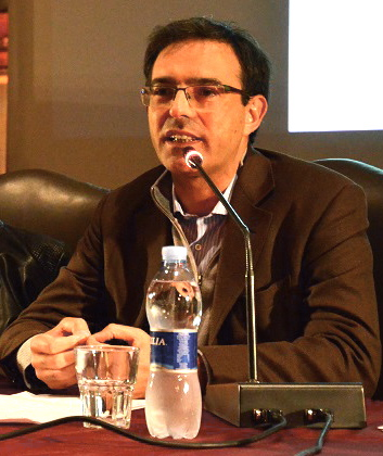 Il teologo italiano Vito Mancuso durante un convegno nella Scuola Grande di San Rocco. La conferenza si è svolta nell'ambito delle celebrazioni per il 25º anniversario dell'Associazione Volontari Assistenza Pazienti Oncologici; tema del convegno è stato: Come migliorare la qualità della vita del paziente oncologico. Venezia, 8 ottobre 2013.